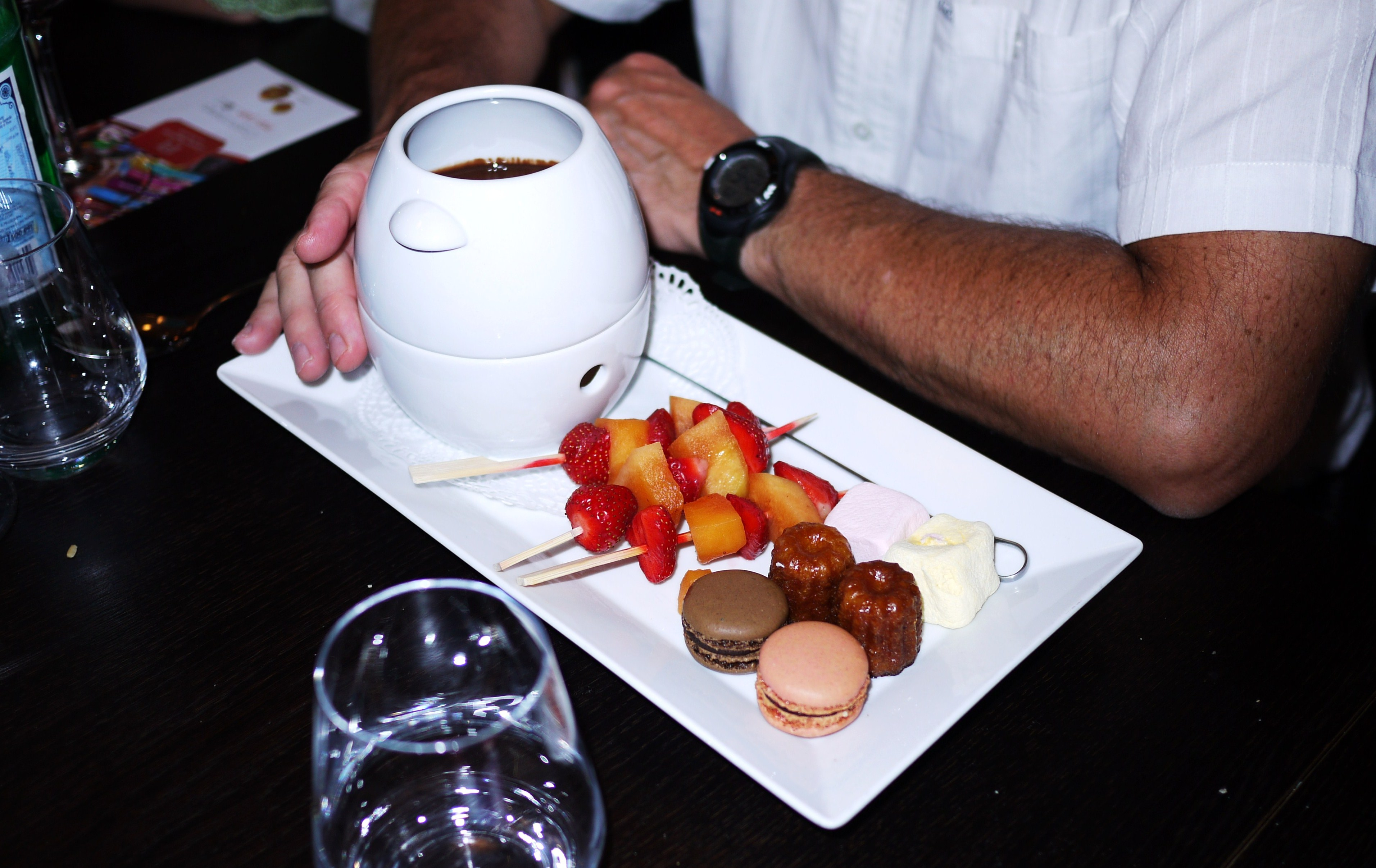 Une fondue au chocolat avec ses fruits et ses gâteaux. Ce dessert était à la carte du restaurant Le Bellevue du casino de La Rochelle en juin 2012. Une fondue au chocolat est un dessert qui consiste à tremper des morceaux de fruit dans du chocolat chaud liquide.